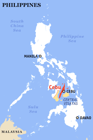 Cebuano: Mapa sa Pilipinas nga nagapakita asa nahimutangan ang lalawigan sa Sugbo. Gihimo ug gi-copyright (2003) ni Seav (sa Iningles na Wikipedya). Gipagawas sa ubos sa GNU FDL.